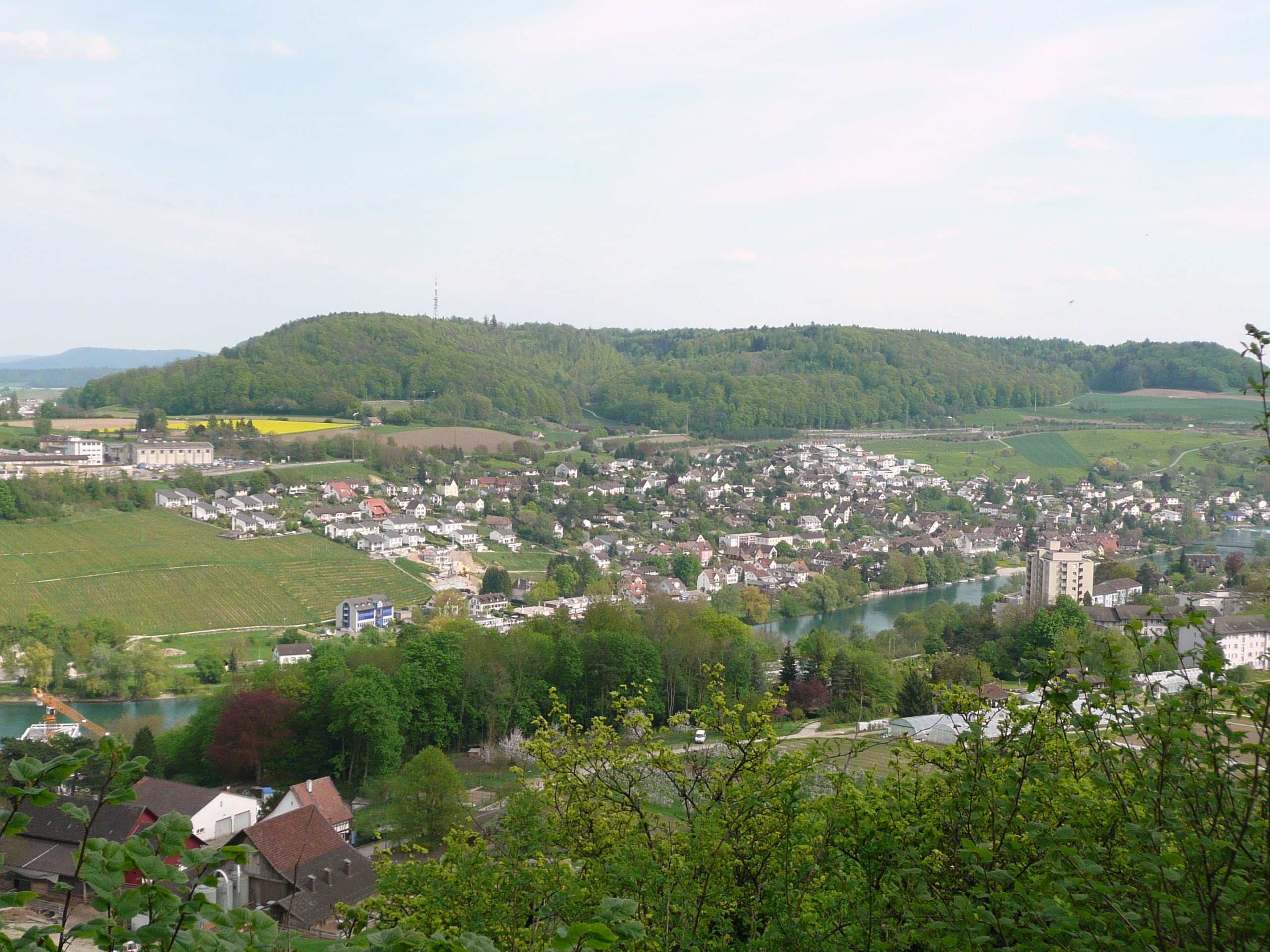 Cholfirst von Neuhausen am Rheinfall aus gesehen mit Rhein und Flurlingen.